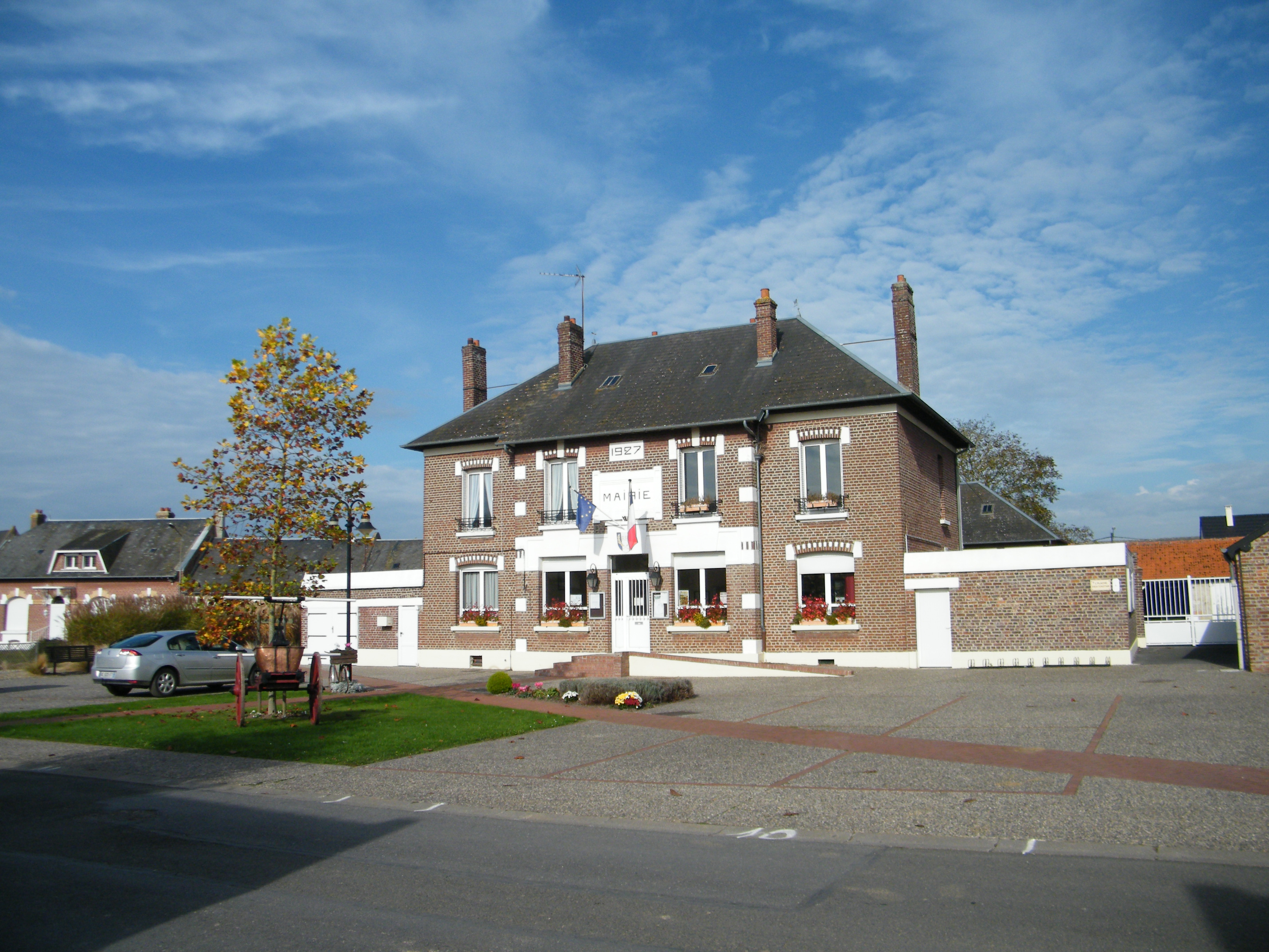 Mairie.